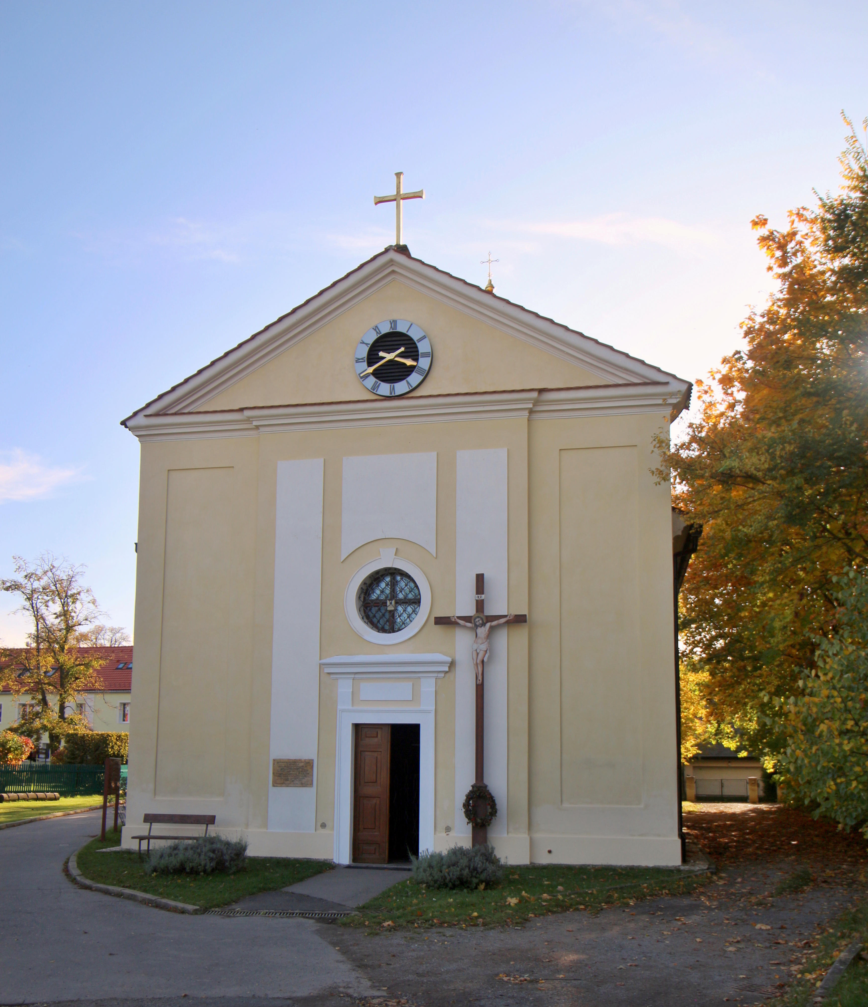 Kostel Povýšení svatého Kříže v Praze-Kolodějích